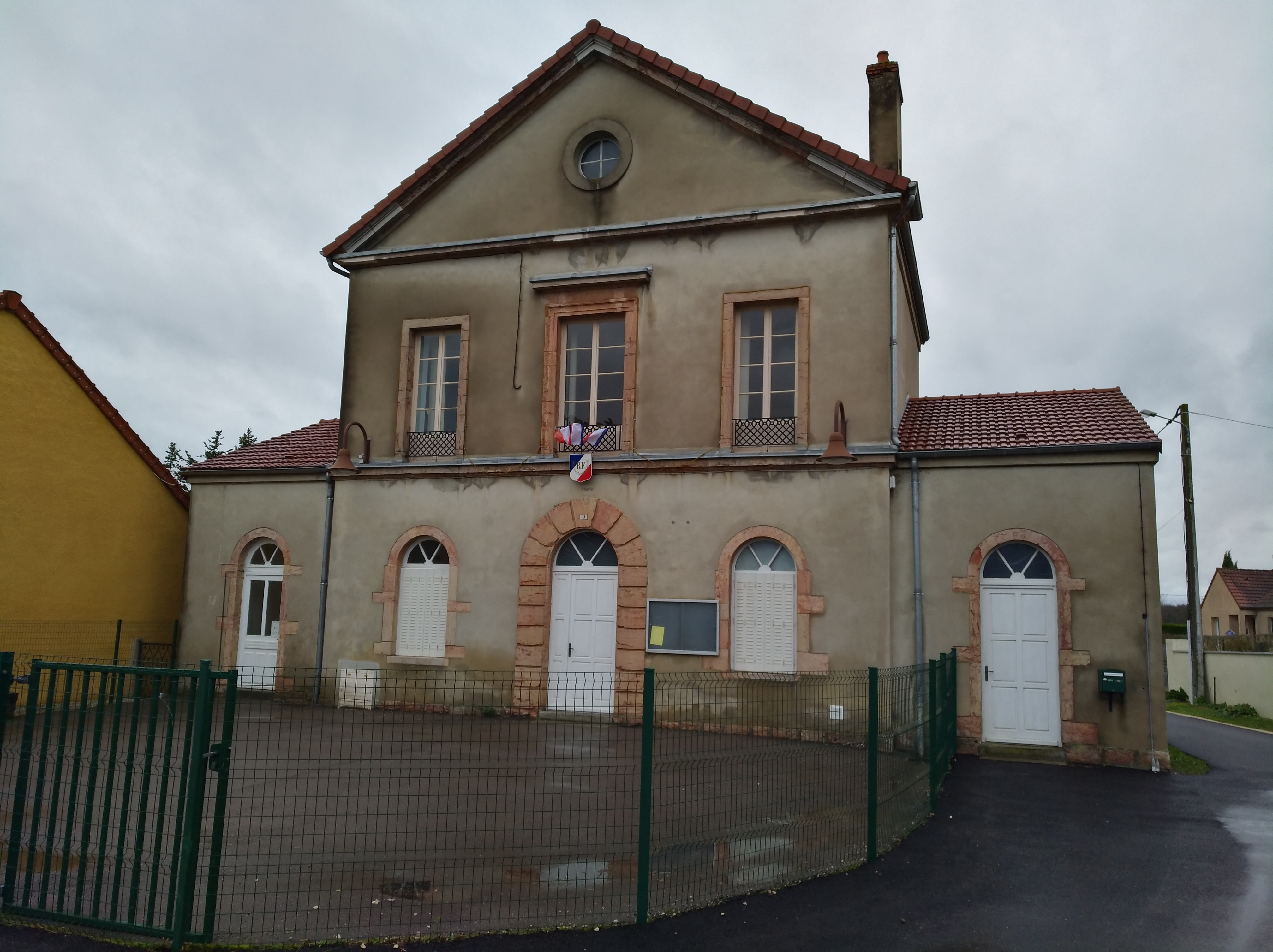 Billey (Côte-d'Or, France) en janvier 2018.